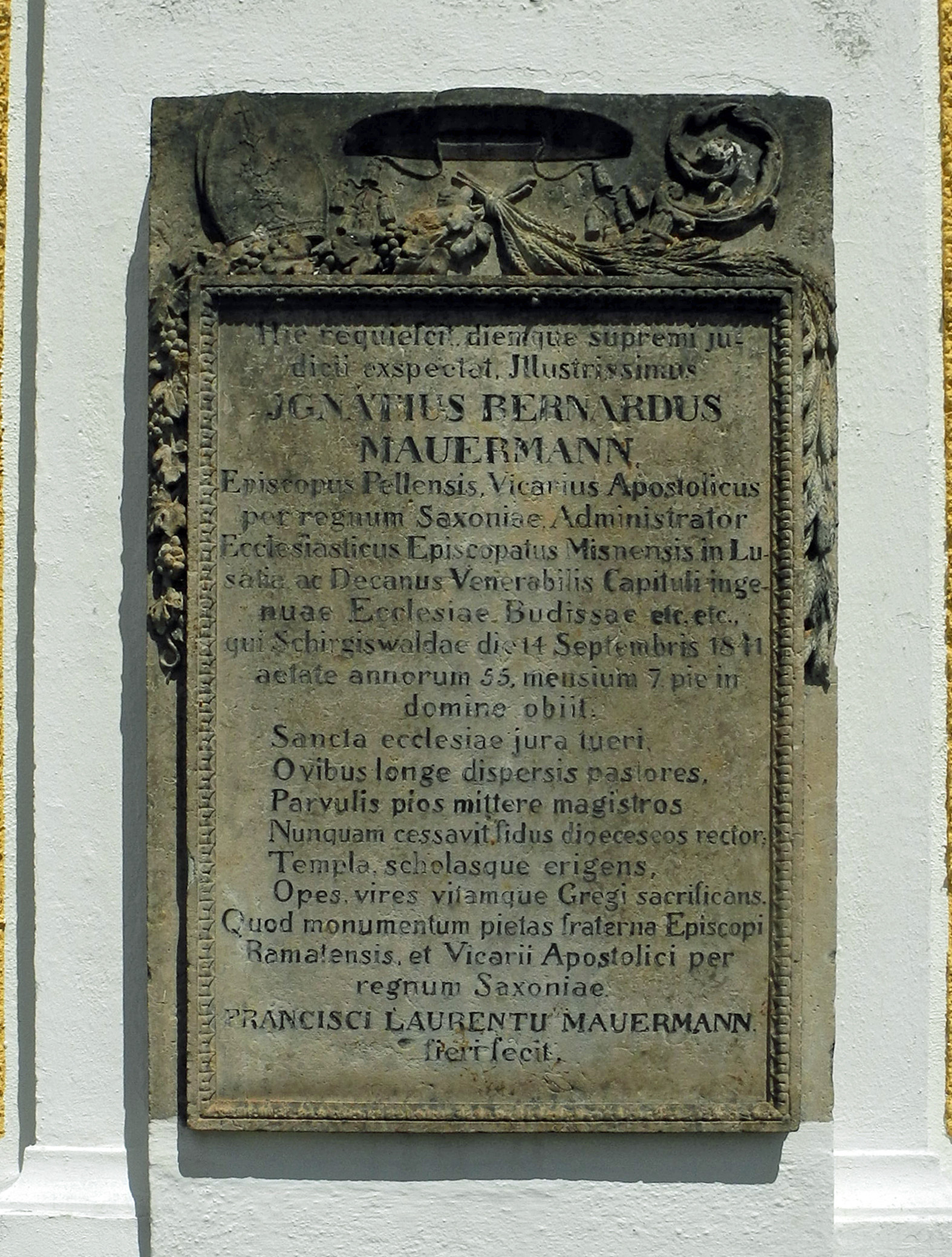 Epitaph für Bischof Ignaz Bernhard Mauermann (1786 –1841) an der kath. Pfarrkirche St. Mariä Himmelfahrt